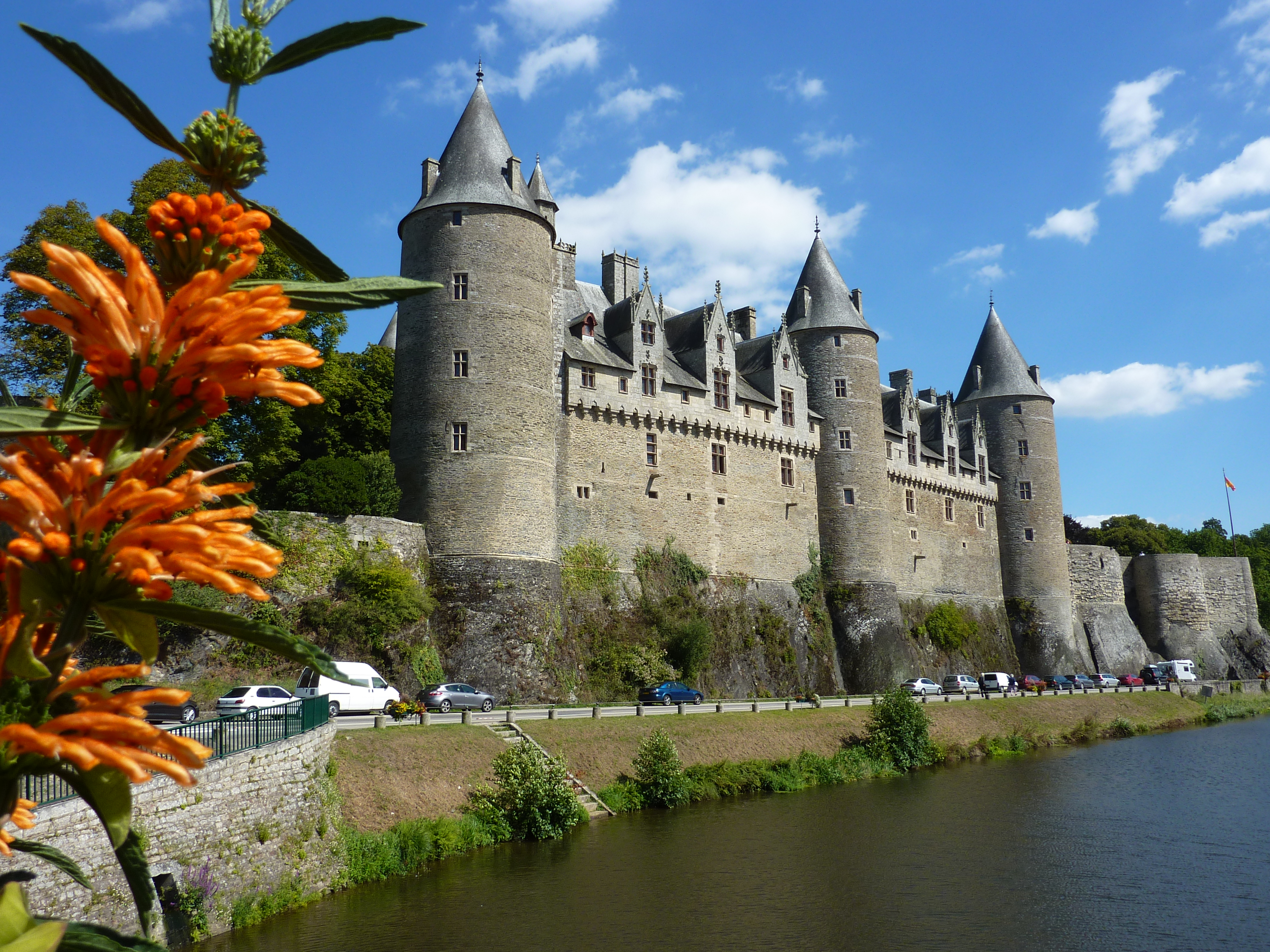 Vue du château de Josselin depuis la rivière, avec des fleurs .